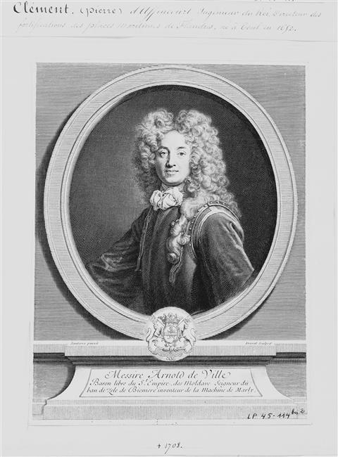 Arnold de Ville (1653 – 1722), Konstrukteur der ersten Maschine von Marly